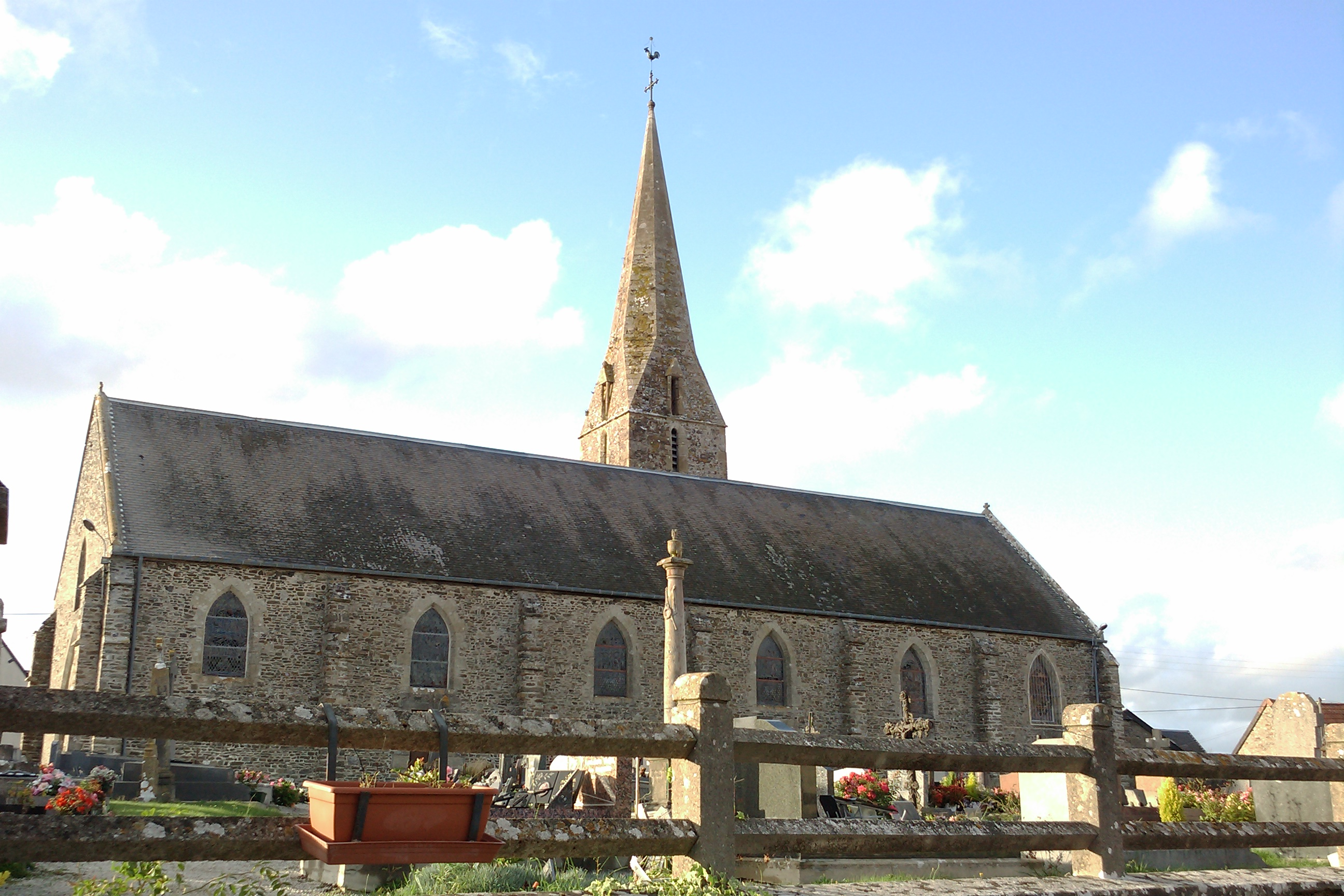 Église Saint-Martin de Bretteville-sur-Ay